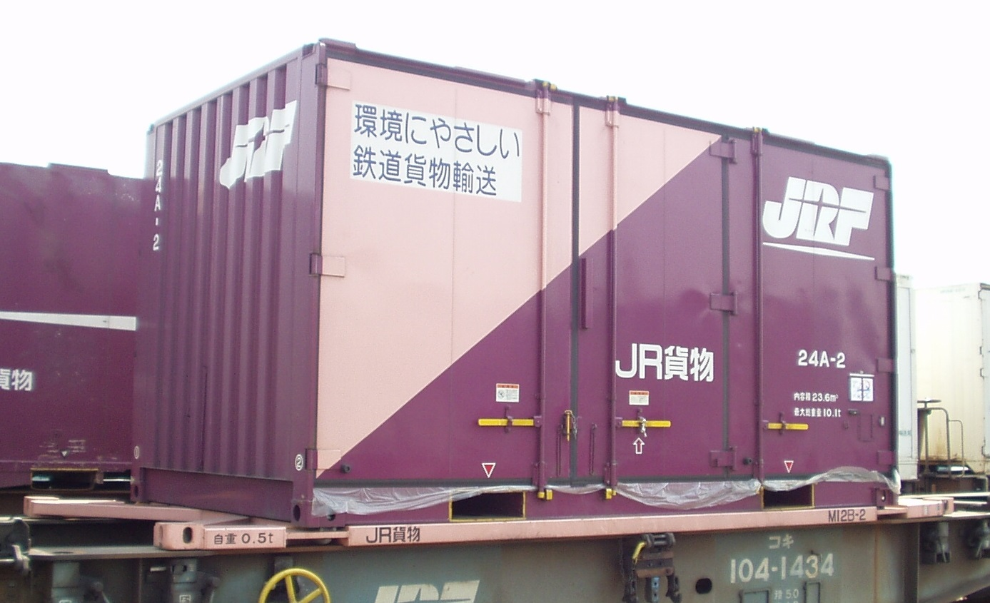 撮影地＝【大阪(タ)】